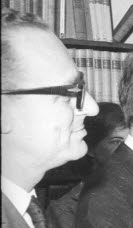 Generalintendant Joachim Klaiber (1.v.r.) spricht vor den Gästen, u.a. Oberbürgermeister Hans Müthling (3.v.r.), Komponist Aribert Reimann (5.v.r.) und der Leiter der Stockholmer Oper Michael Gielen (7.v.r.).